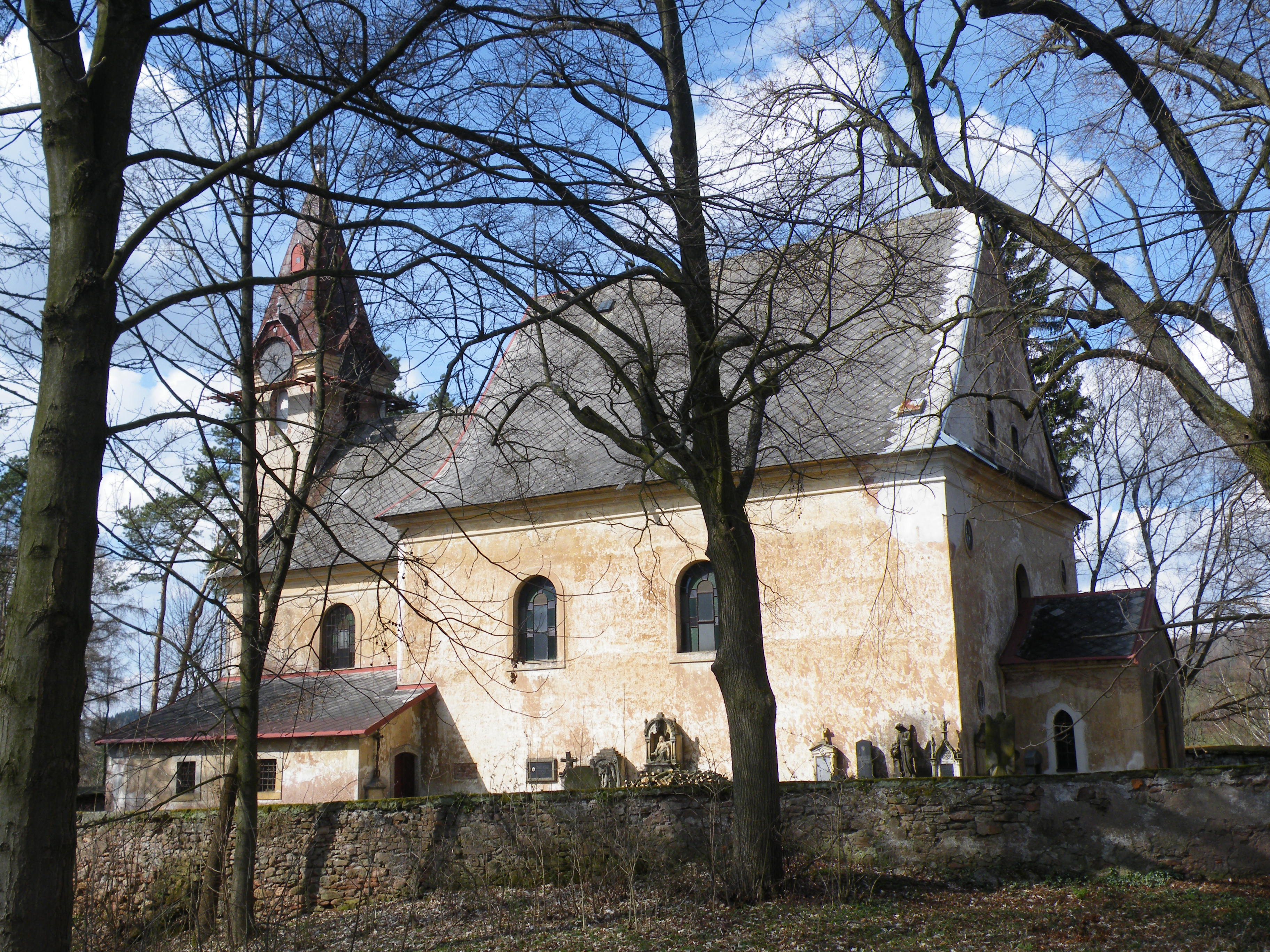 Kostel svatých Šimona a Judy, Starý Rokytník.